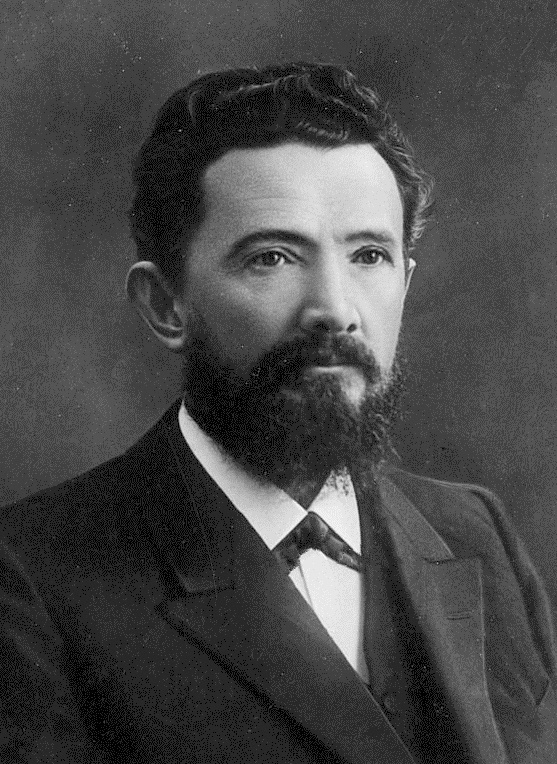 Vladimir Palladin